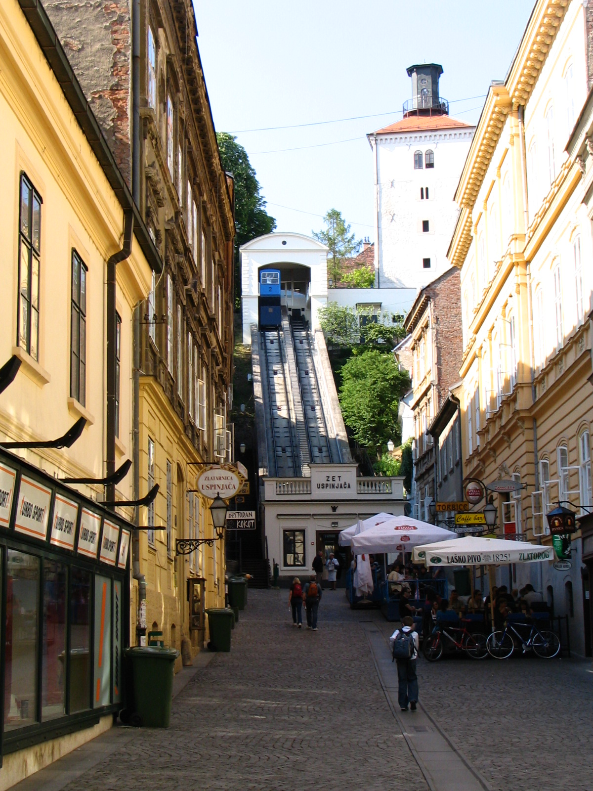 Zagreb funikuler